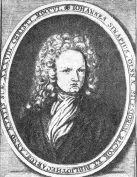 Ján Sinapius-Horčička mladší (1657-1725), Sileisan pedagogist of Slovak origin